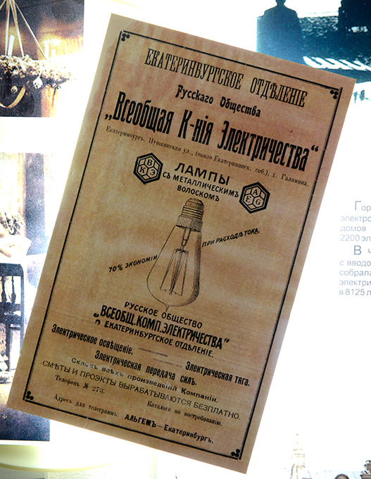 Электрические приборы и книга